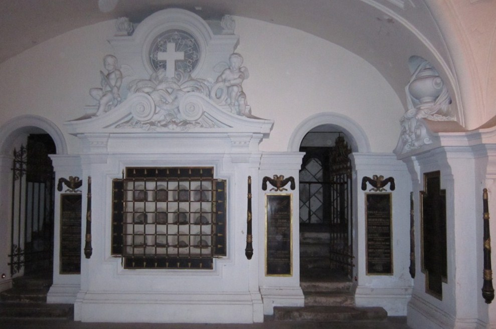 Crypte des martyrs, Église Saint-Joseph-des-Carmes